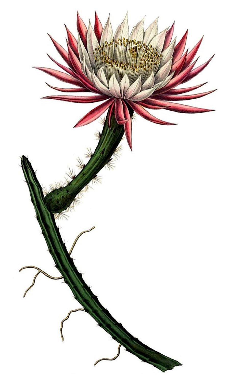 Selenicereus spinulosus